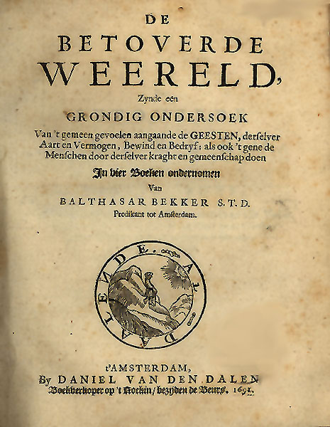 Titelblad uit 1691 betoverde weereld. Ik heb deze foto zelf gemaakt van een boek uit 1695.